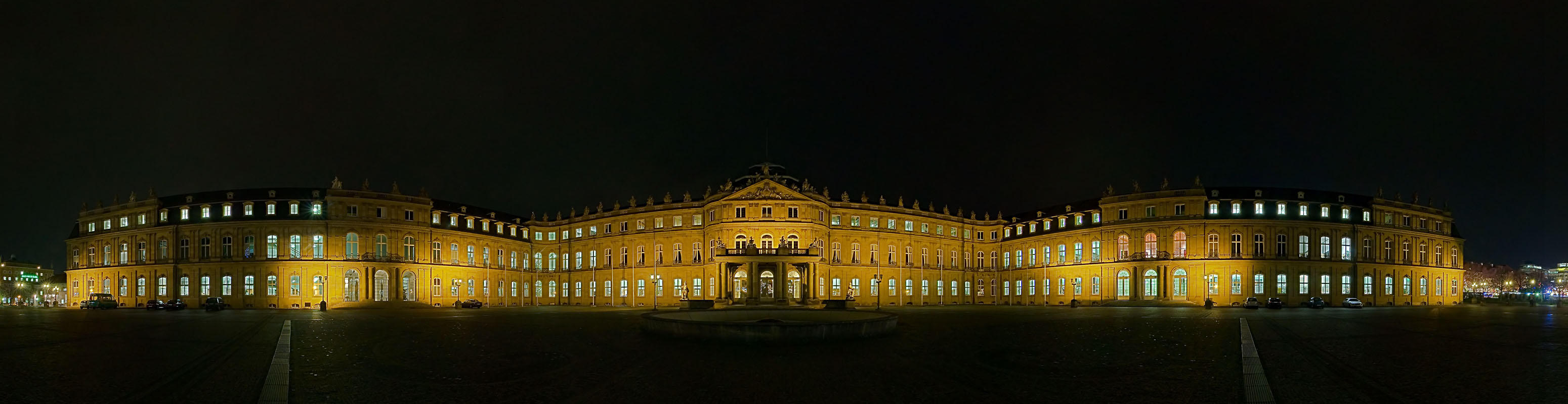 Panoramabild im Ehrenhof des Neuen Schlosses in Stuttgart